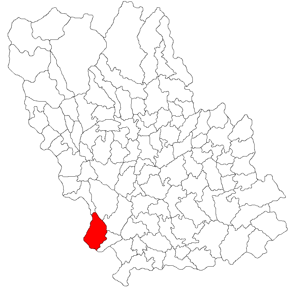 Categorie:Hărţi ale judeţului Prahova